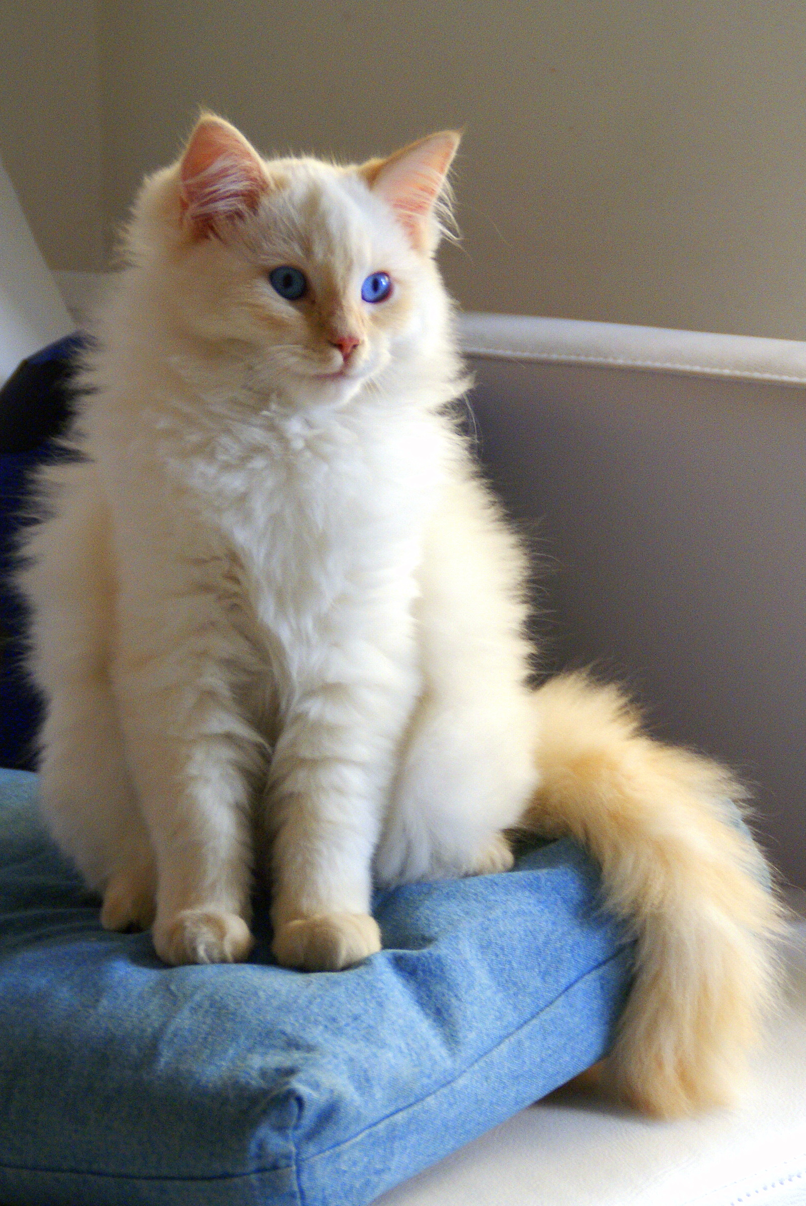 Flame point Ragdoll kitten